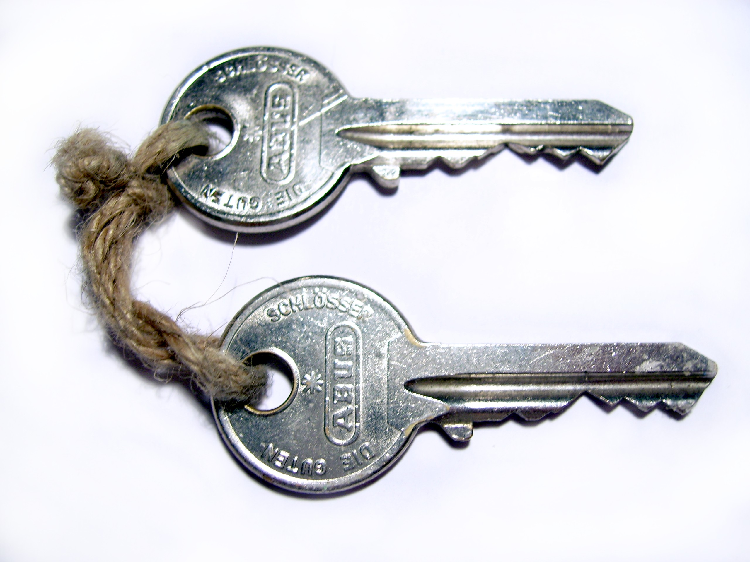 Zwei gleiche Schlüssel von Abus